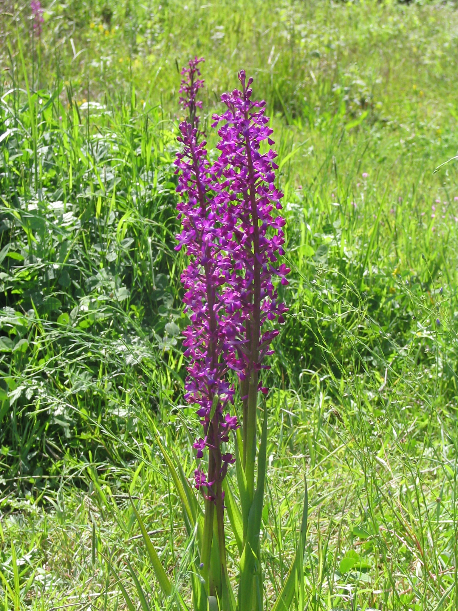 סחלב הביצות